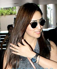 Yami Gautam snapped at Mumbai airport on 15 May 2016.